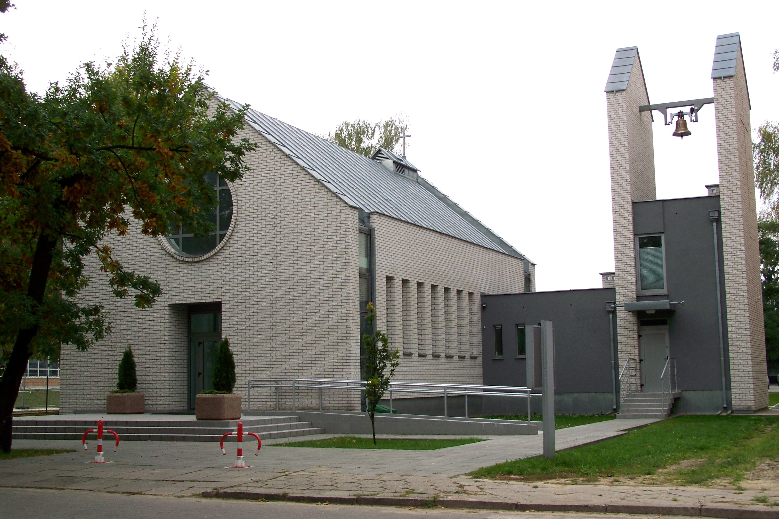 Kaplica Uniwersytecka UKSW na Młocinach przy ulicy Wóycickiego